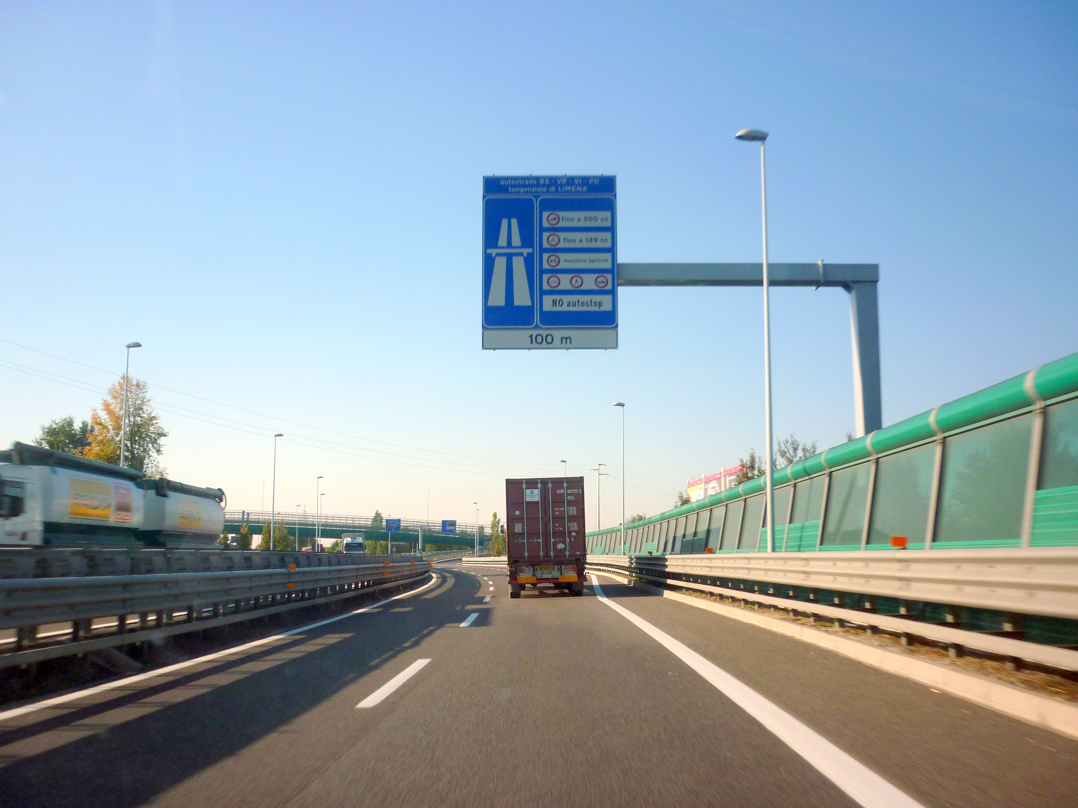 SP47